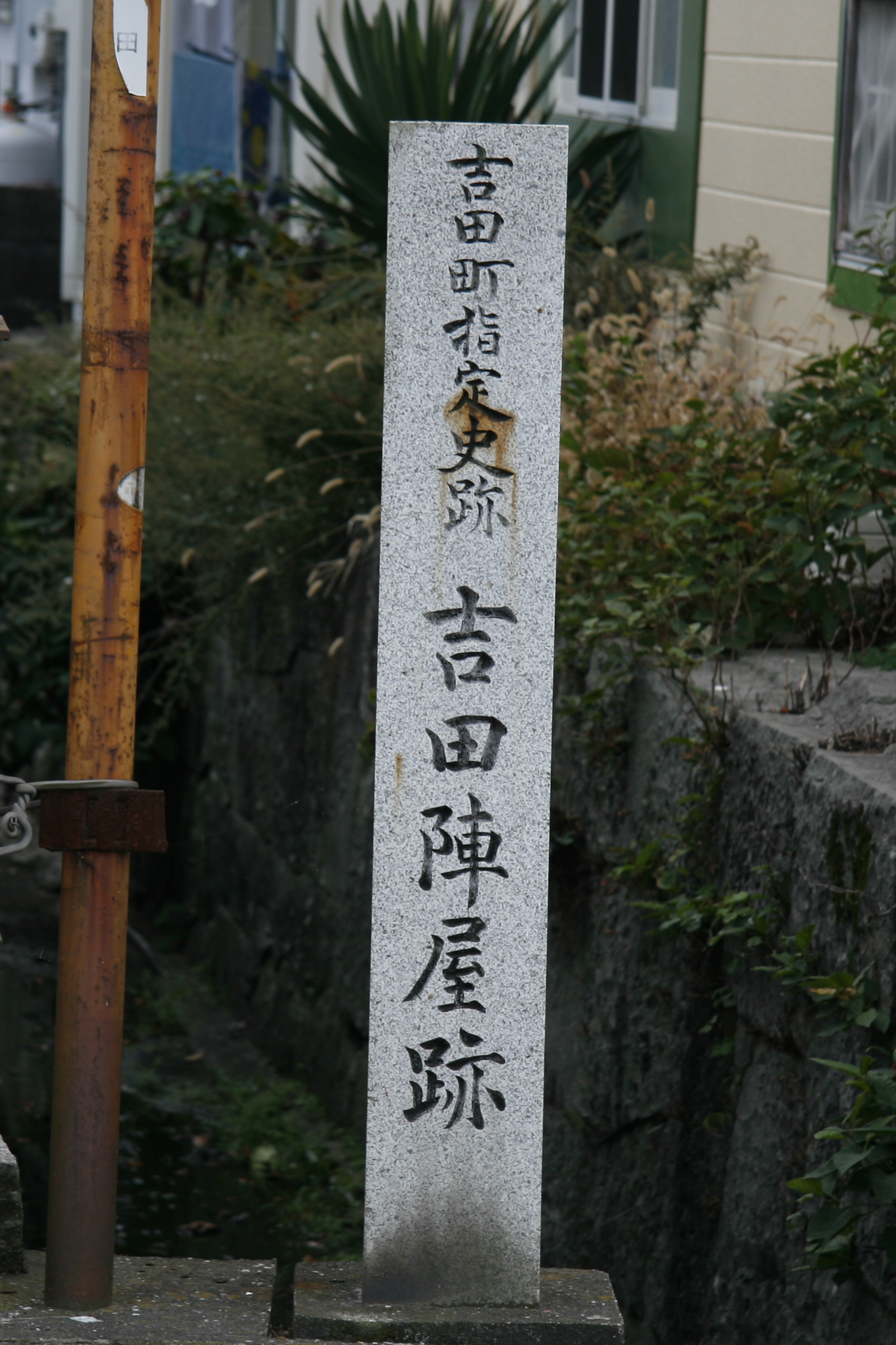 伊予吉田陣屋の石碑